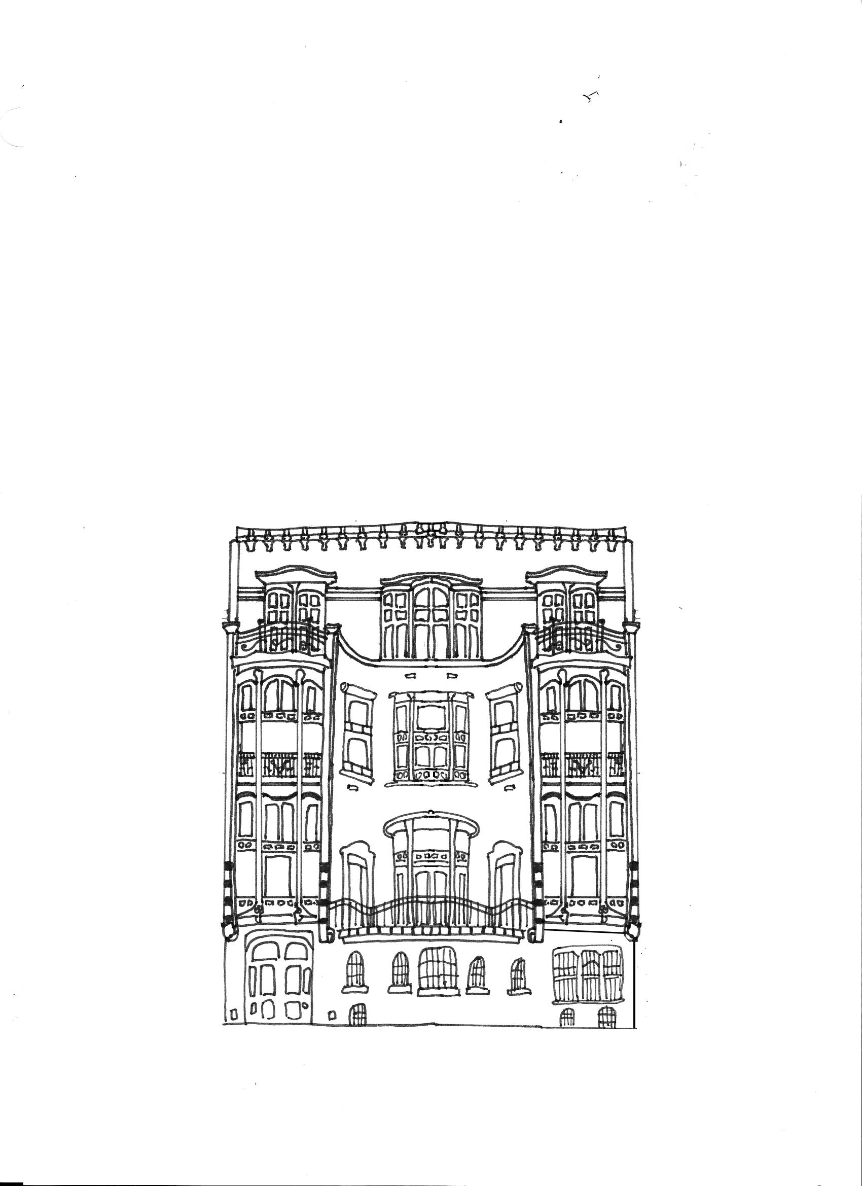 Dessin de l'hôtel Solvay